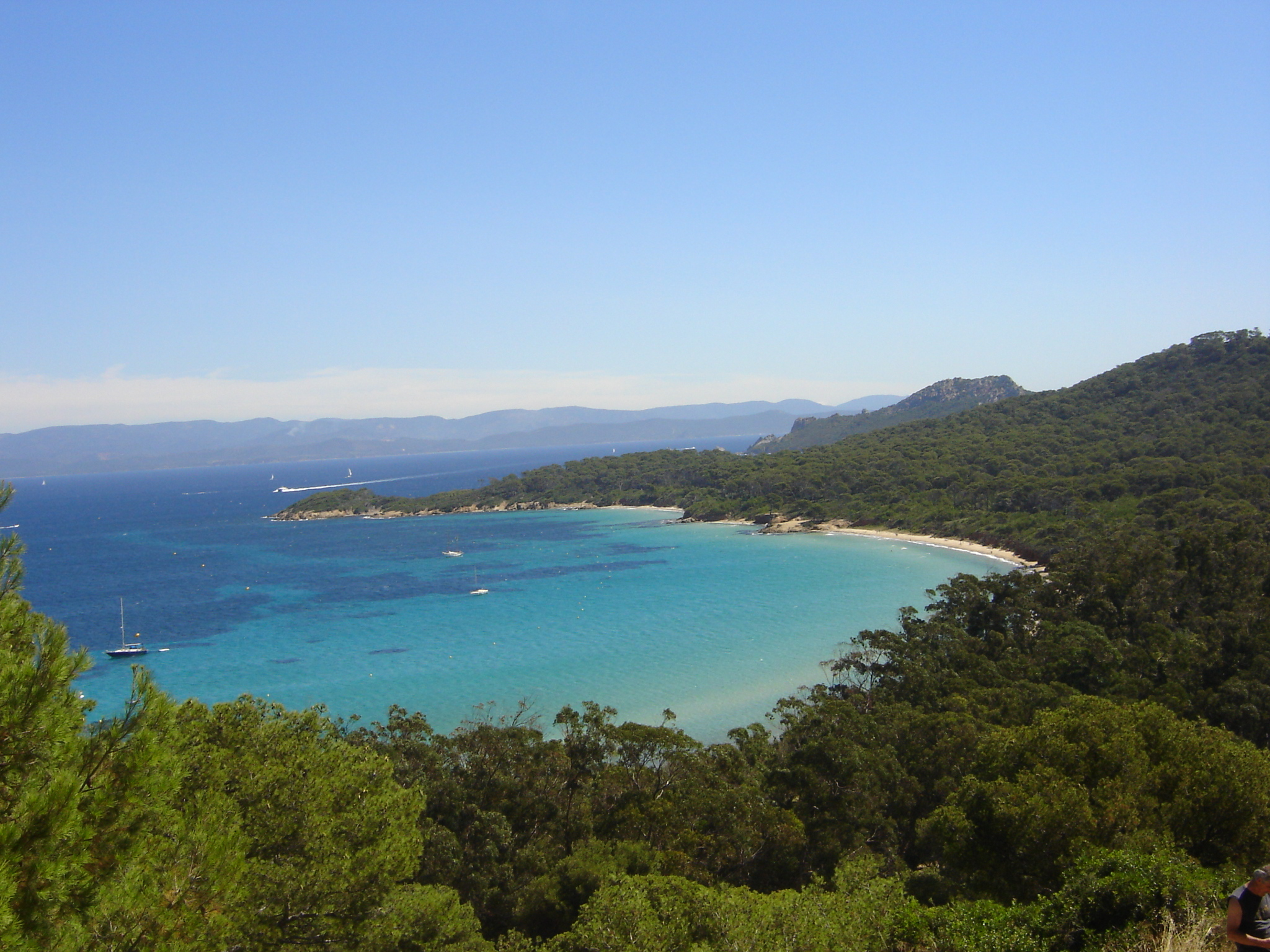 Vue de la côte de l'île de Porquerolles au niveau de la plage de la Courtade.